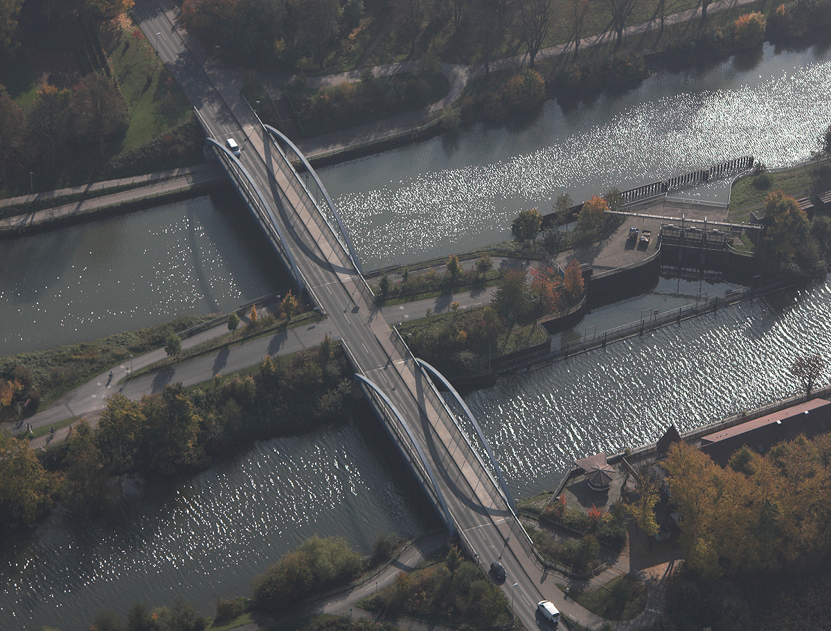 Luftbildaufnahme Hamm